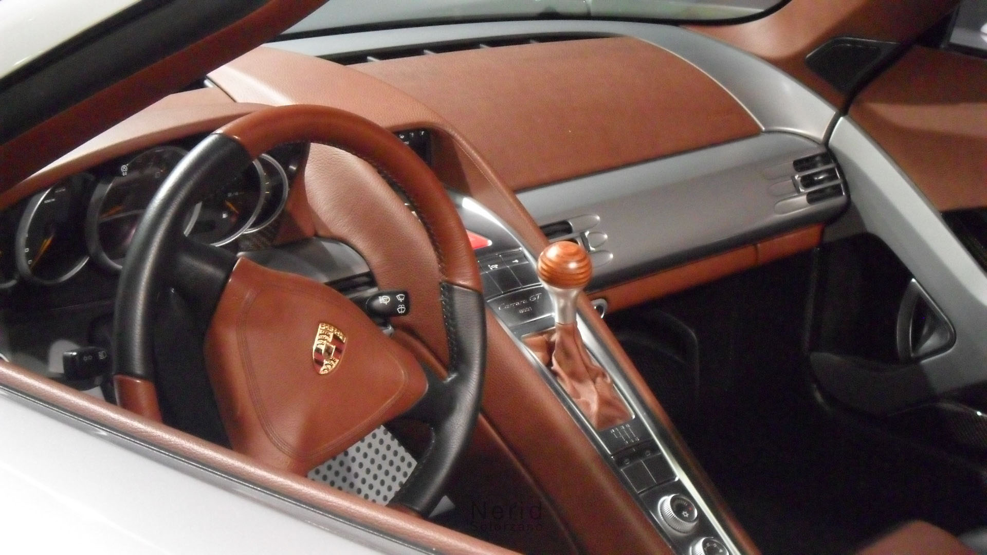 Porsche Carrera GT Int.